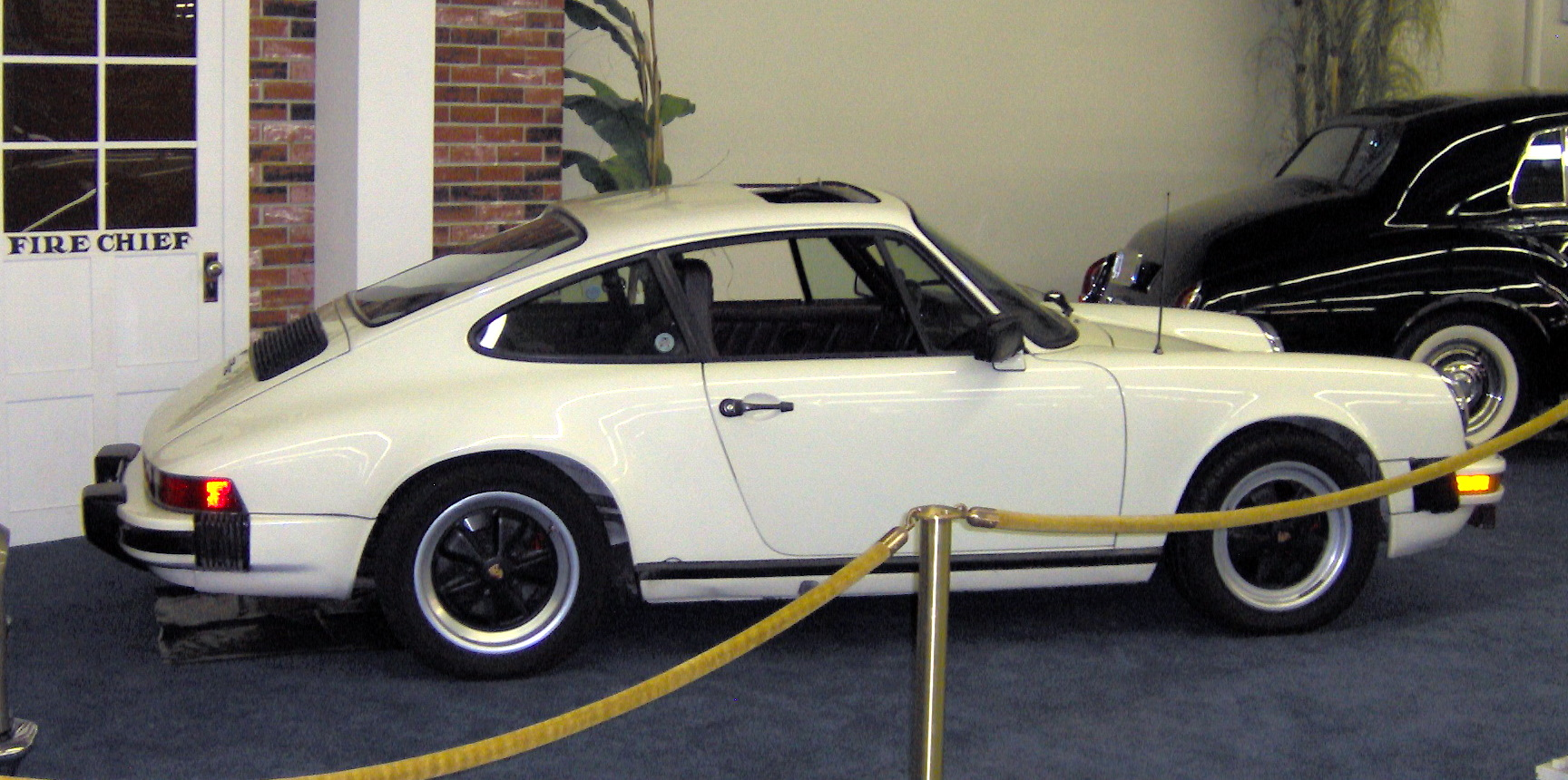 1983 Porsche 911SC Coupe